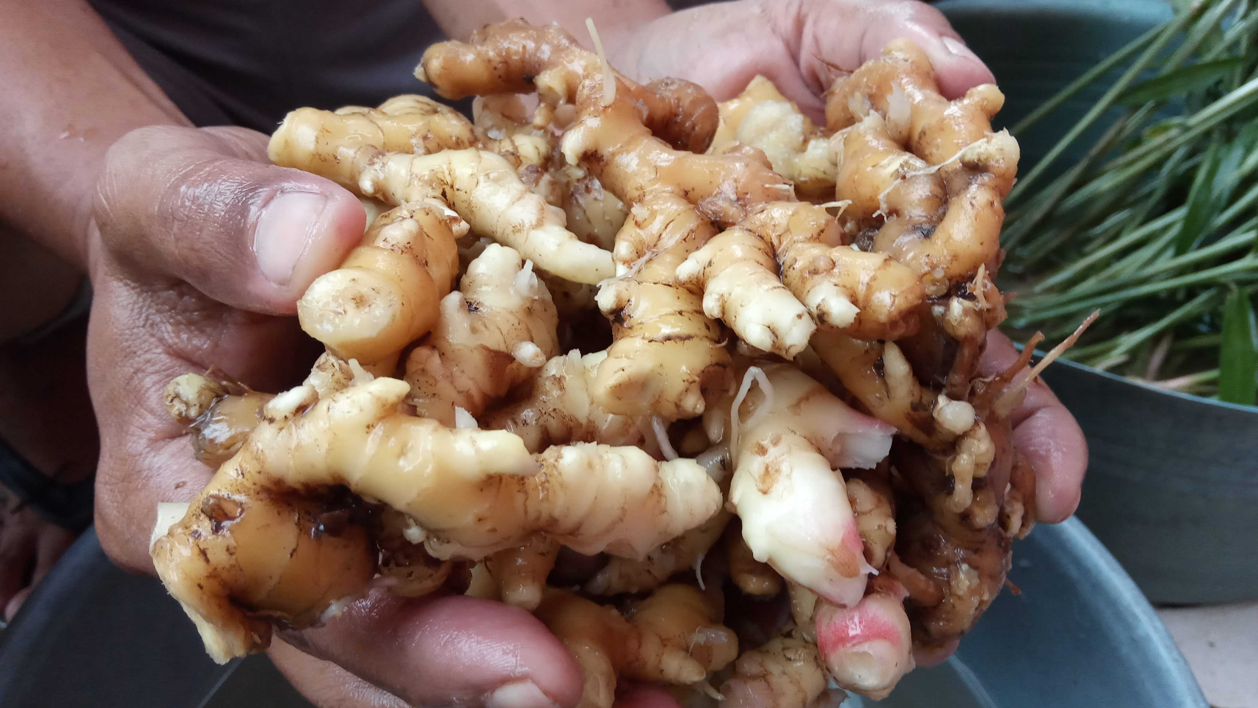 Hasil Panen Jahe Di Kebun SAP Garden Hidroponik